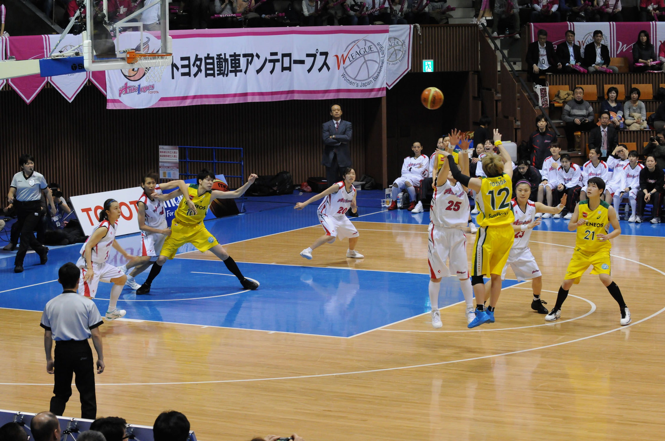 WJBL 14-15プレーオフセミファイナル、トヨタ対JX-ENEOS。代々木第二体育館で。